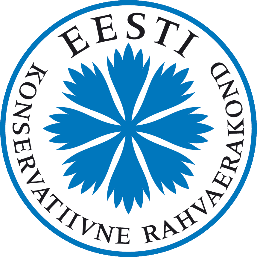 Eesti Konservatiivse Rahvaerakonna 2012. aastal vastu võetud logo.